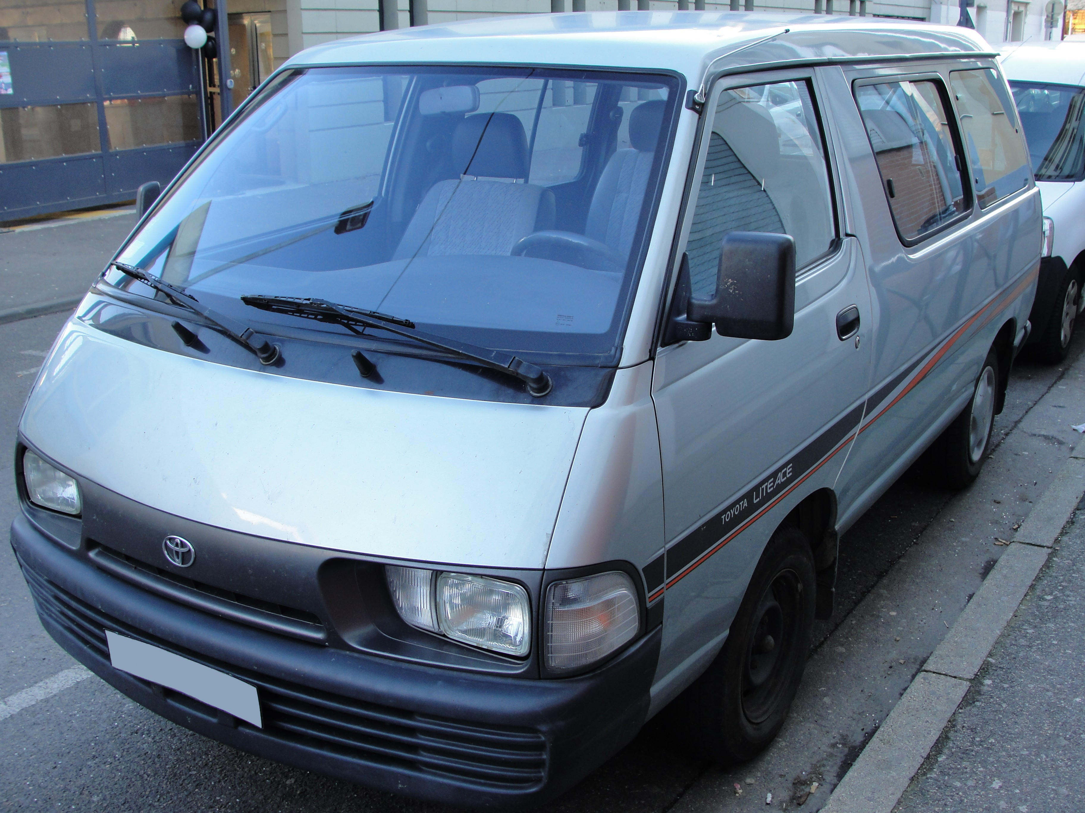 Toyota Lite Ace KR20, ap. 1992 -- ici en finition DX (diesel), moteur 2C 1 974 cm3 délivrant 69 ch.